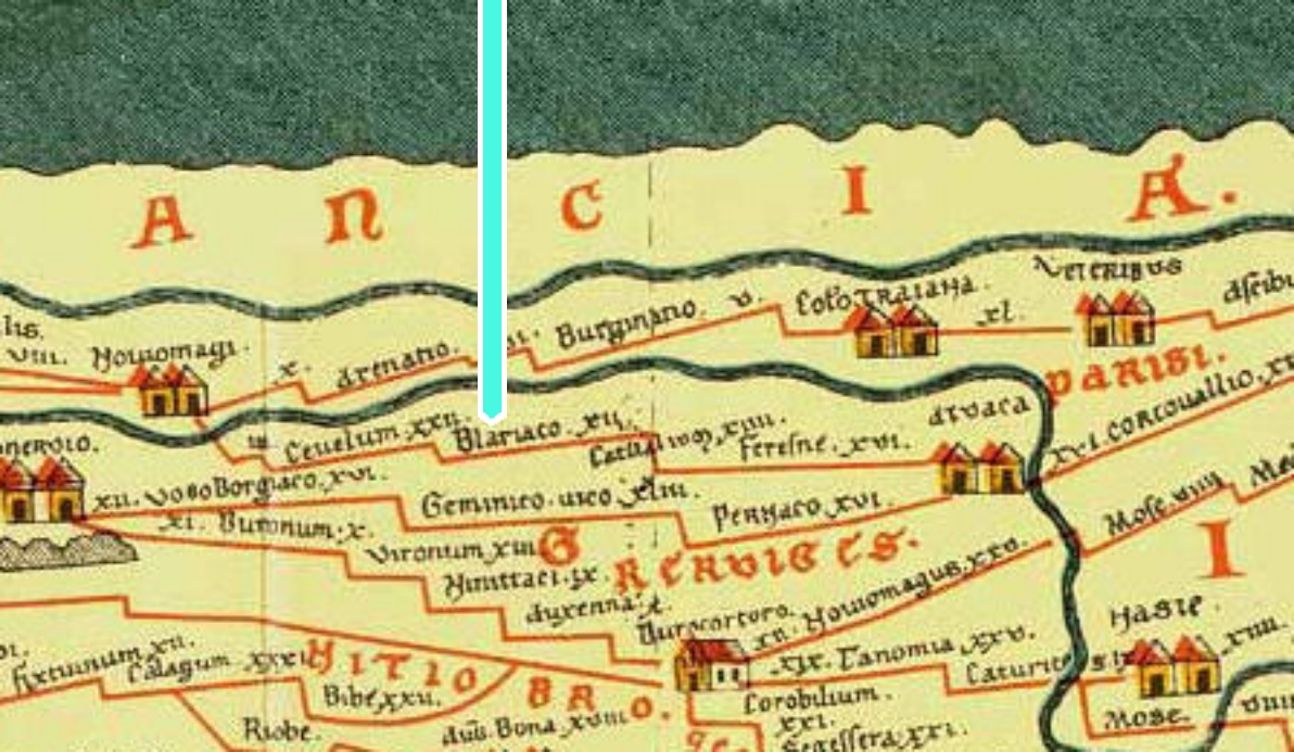 Deel van Tabula Peutingeriana, plaatsmarkering toegevoegd door Sindala